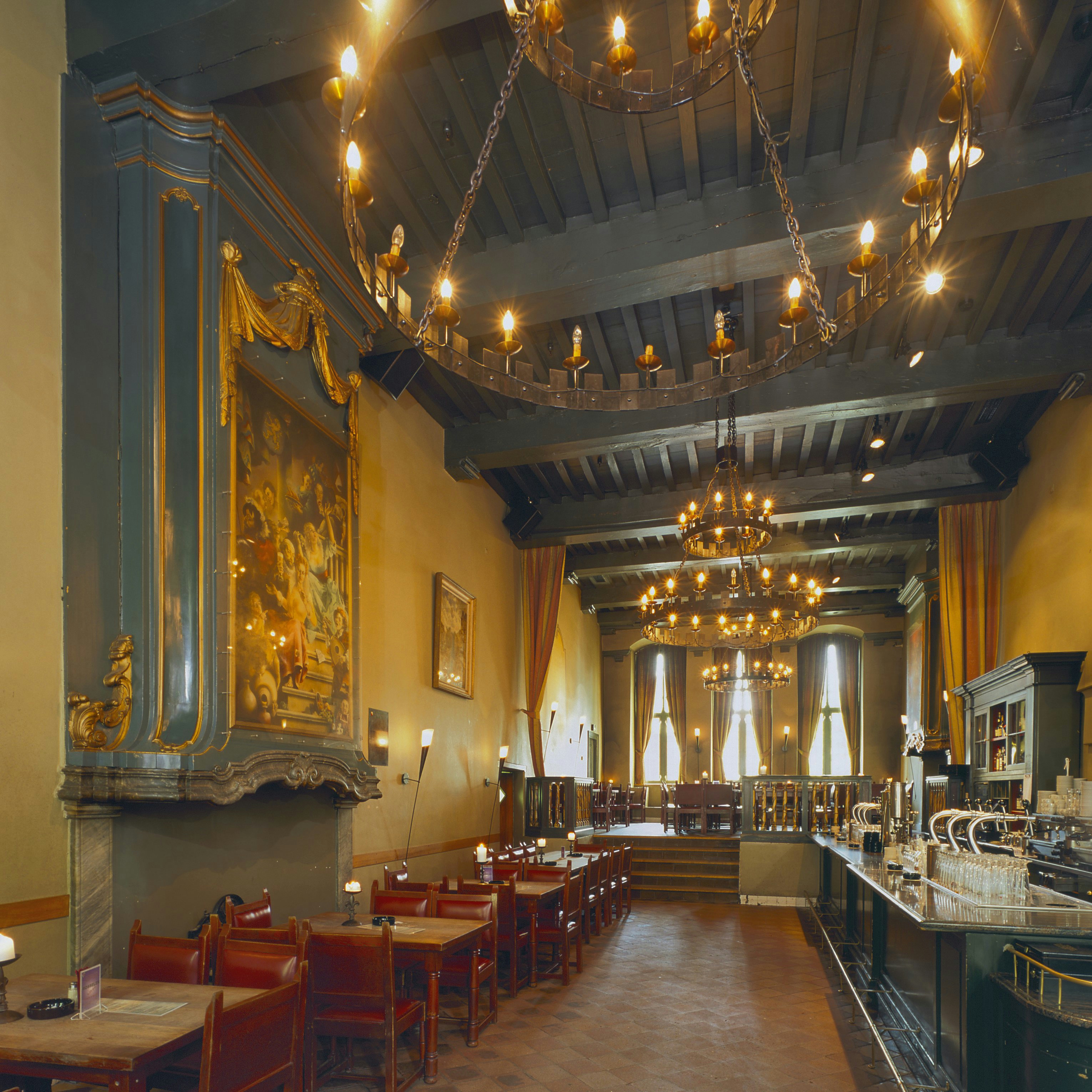 Huis Oudaen: Interieur, overzicht (opmerking: Gefotografeerd voor Bouwen in Nederland 600-2000 (2007))